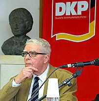 Porträt Dieter Frielinghaus 2005